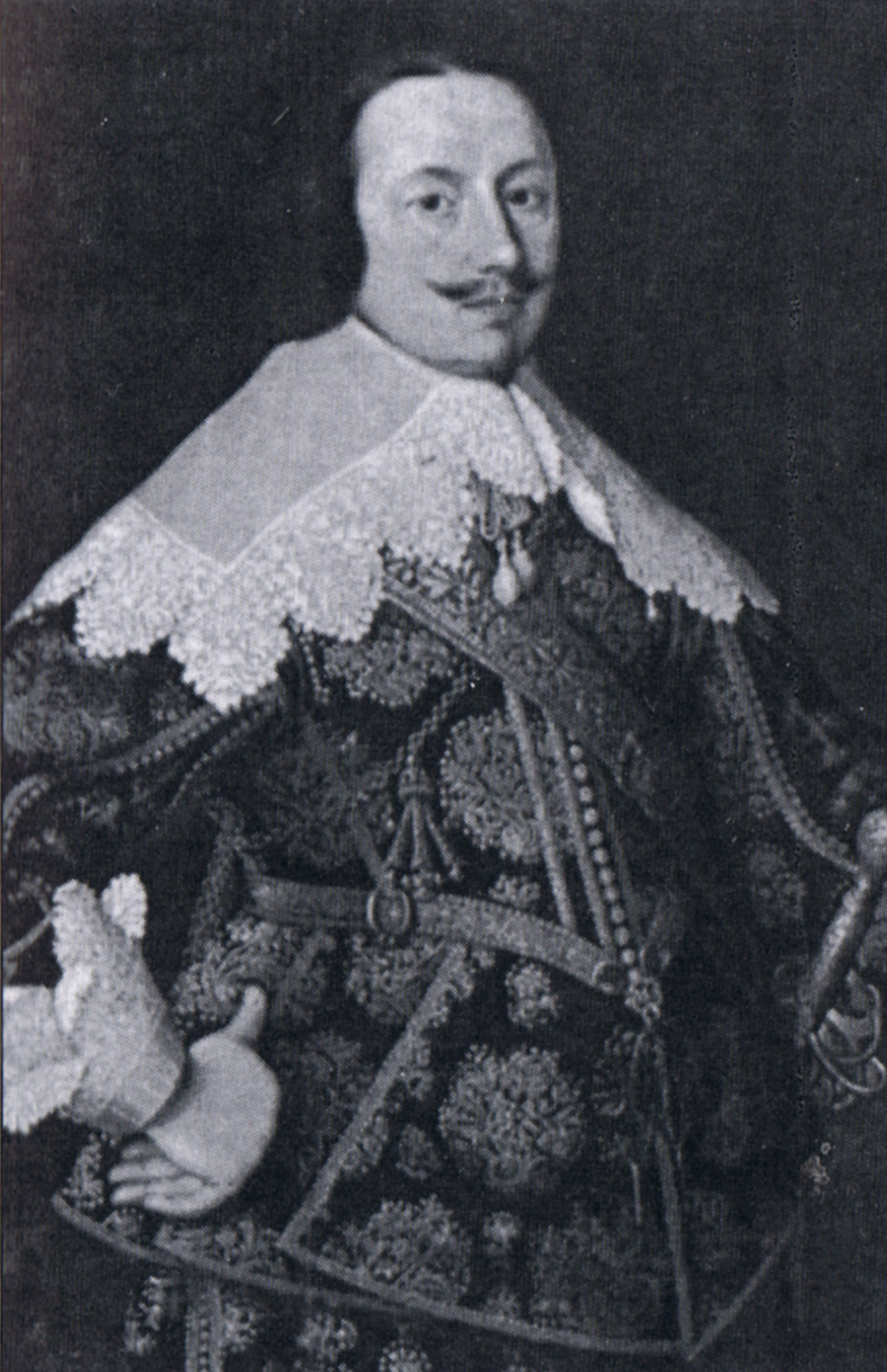 Friedrich III. von Schleswig-Holstein-Gottorf (* 22. Dezember 1597 in Gottorf; † 10. August 1659 in Tönning) war von 1616 bis 1659 Herzog von Schleswig-Holstein-Gottorf.